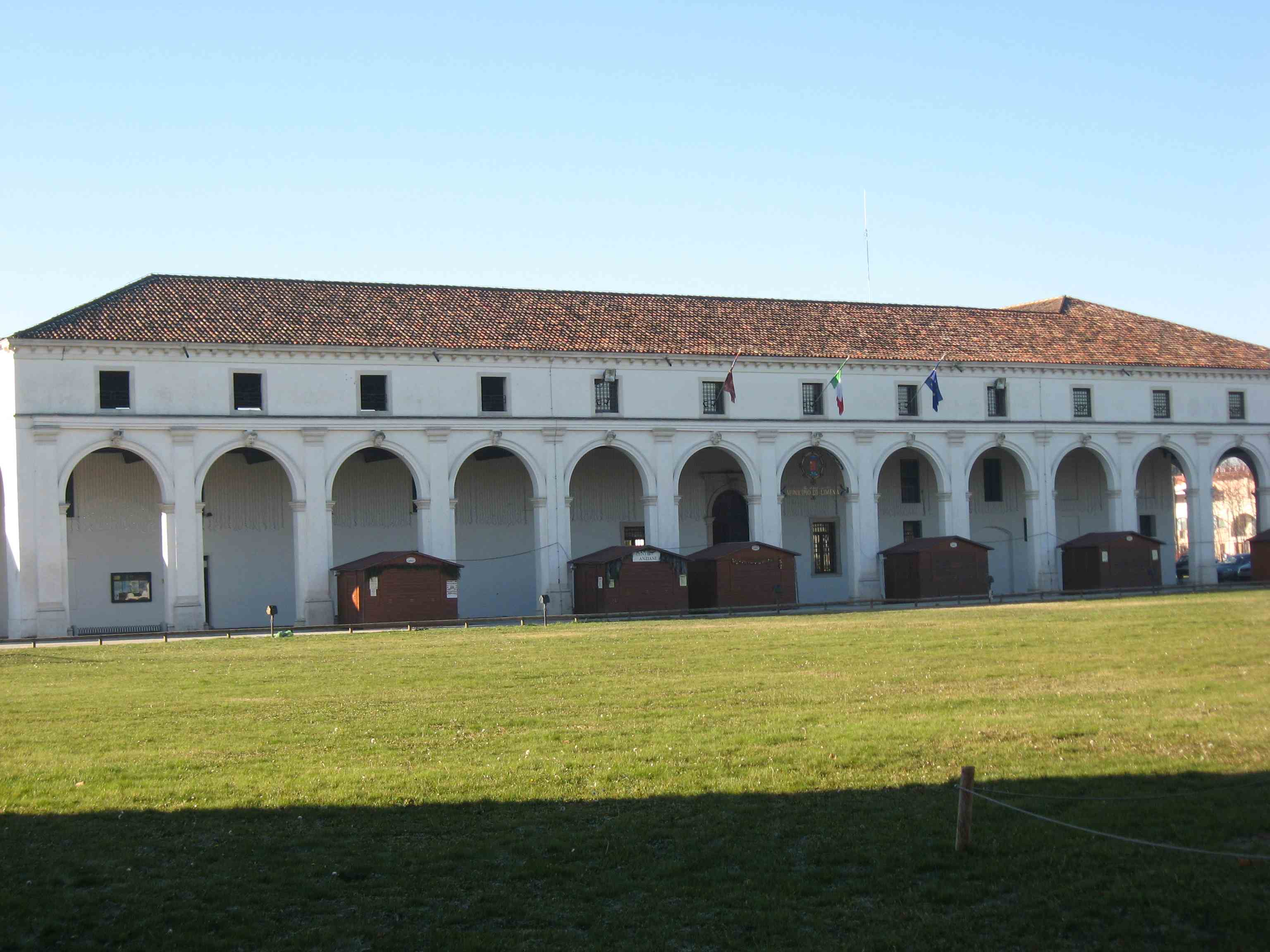 Limena, provincia di Padova: la barchessa della scomparsa Villa Fini, ora sede del Municipio.